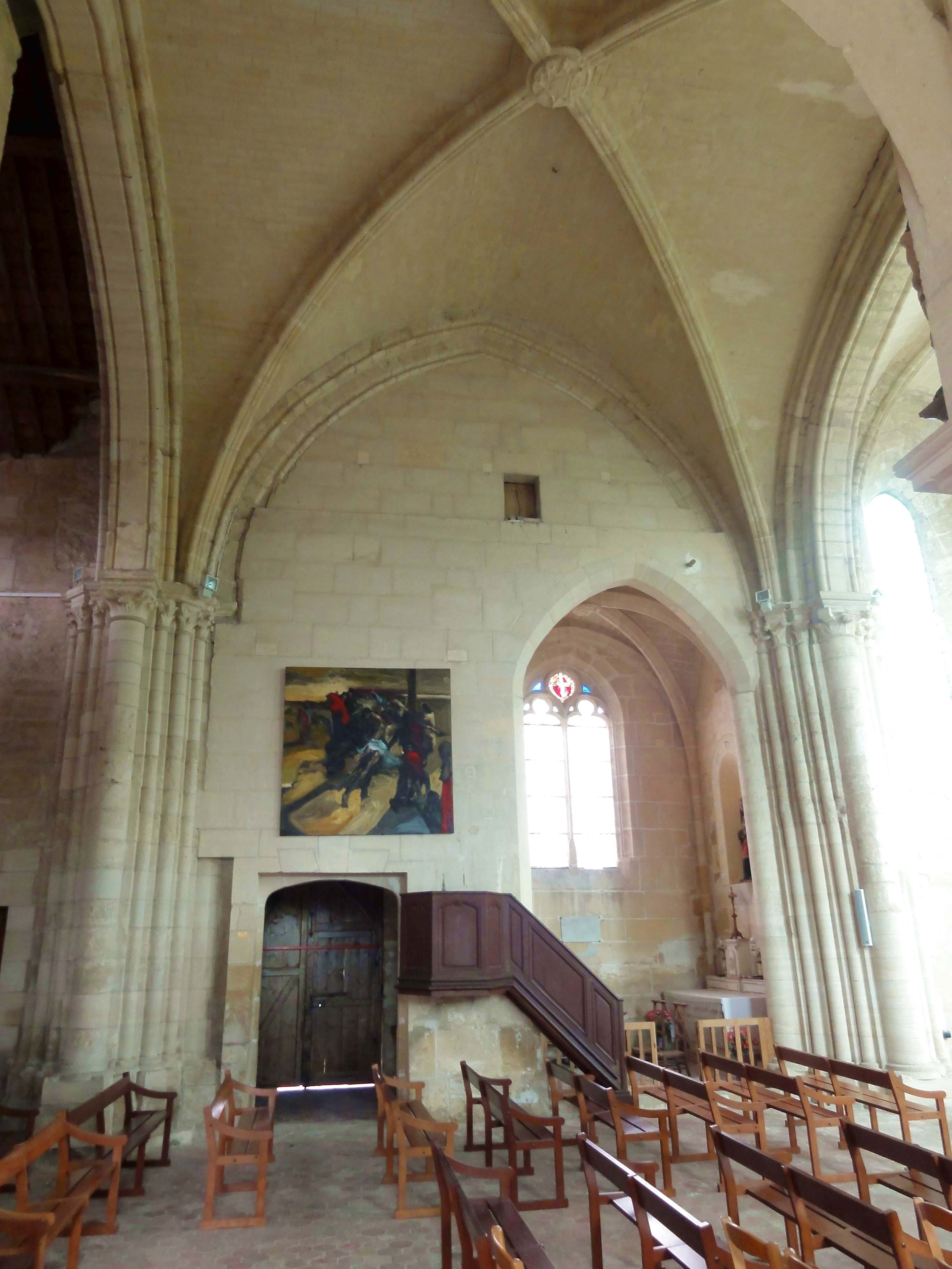 Intérieur de l'église (voir titre).